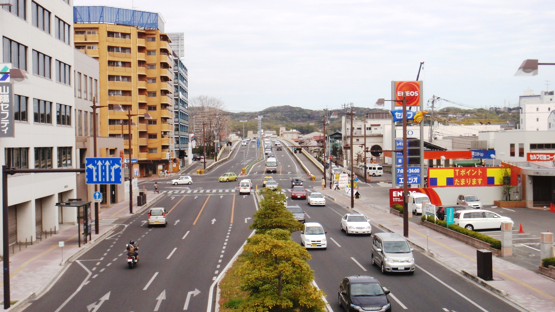 岡山県岡山市北区の国道250号（旧国道2号）、東山通りの風景。表町三丁目付近から東方向、新京橋を見る。